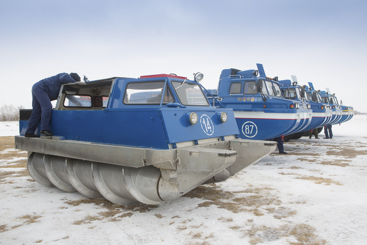 Учение поисково-спасательного отряда Центрального военного округа по обнаружению и эвакуации экипажа космического корабля «Союз ТМА» (Челябинской область)